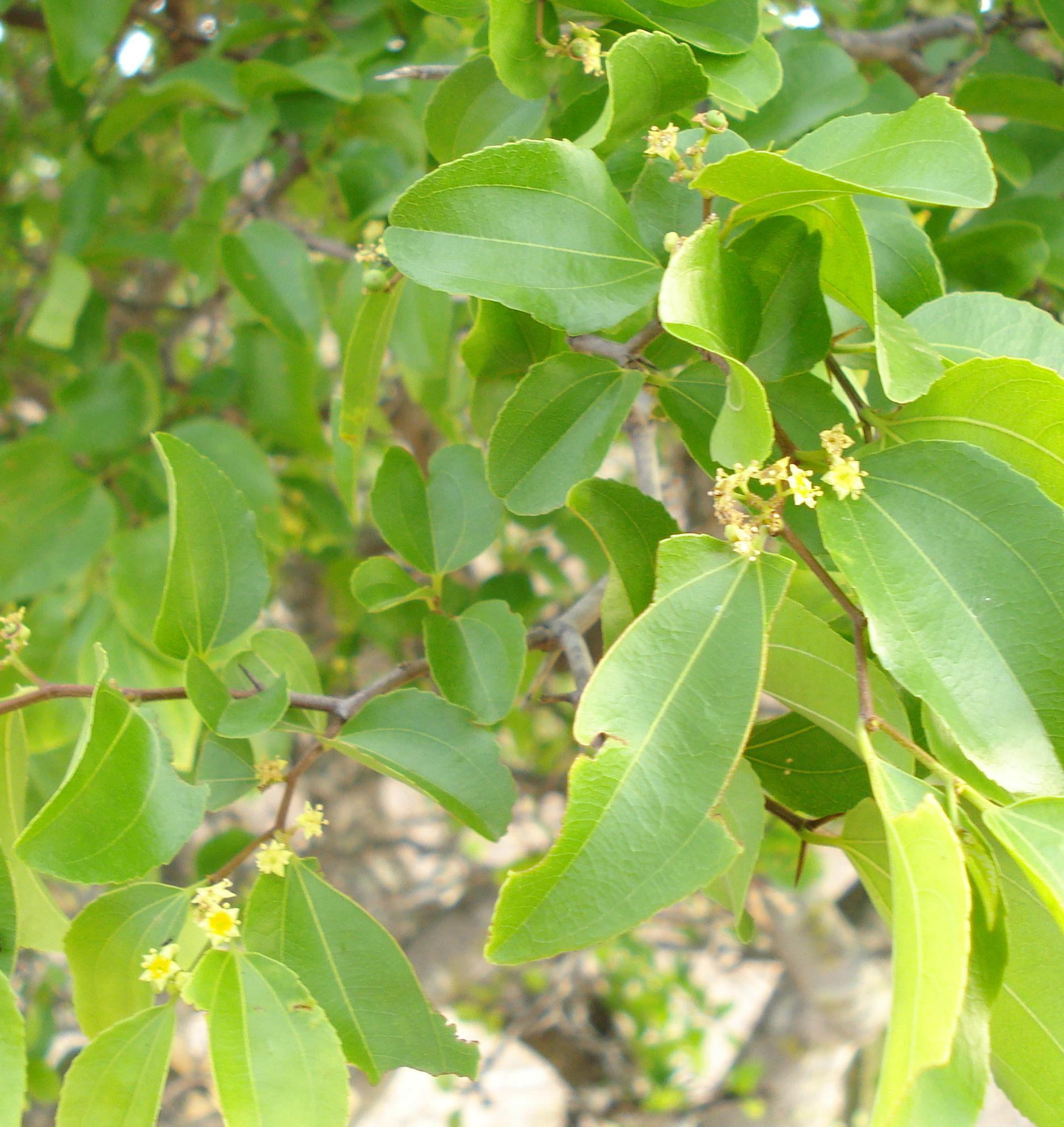 Florres de Juazeiro (Zizyphus joazeiro)